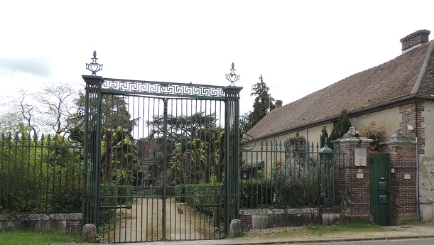 La Terrasse: ancienne propriété du château avec sa grille en fer forgé peinte en vert et scellée dans un muret de pierres de taille. Derrière arbres et arbustes de part et d'autres de la perspective d'accès à la façade et à droite ancien bâtiment des communs à chaînages de briques